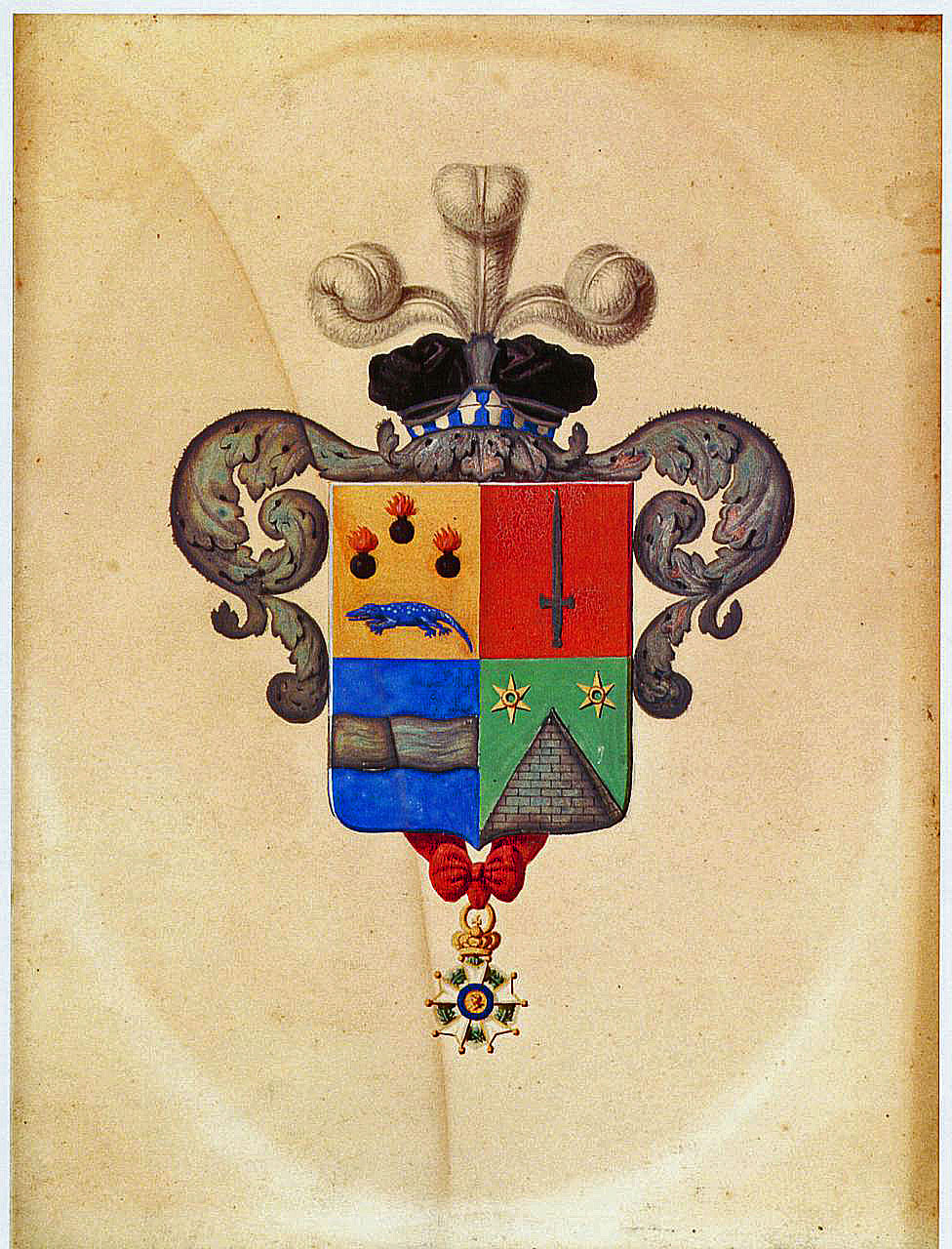 Ecartelé: au 1er, d'or à trois grenades de sable, allumées de gueules,1.2, surmontées d'un crocodile arrêté d'azur; au 2ème, des barons militaire; au 3ème, d'azur à une fasce ondée d'argent; au 4ème, de sinople à la pyramide d'argent, accompagnée en chef de deux mollettes d'or.